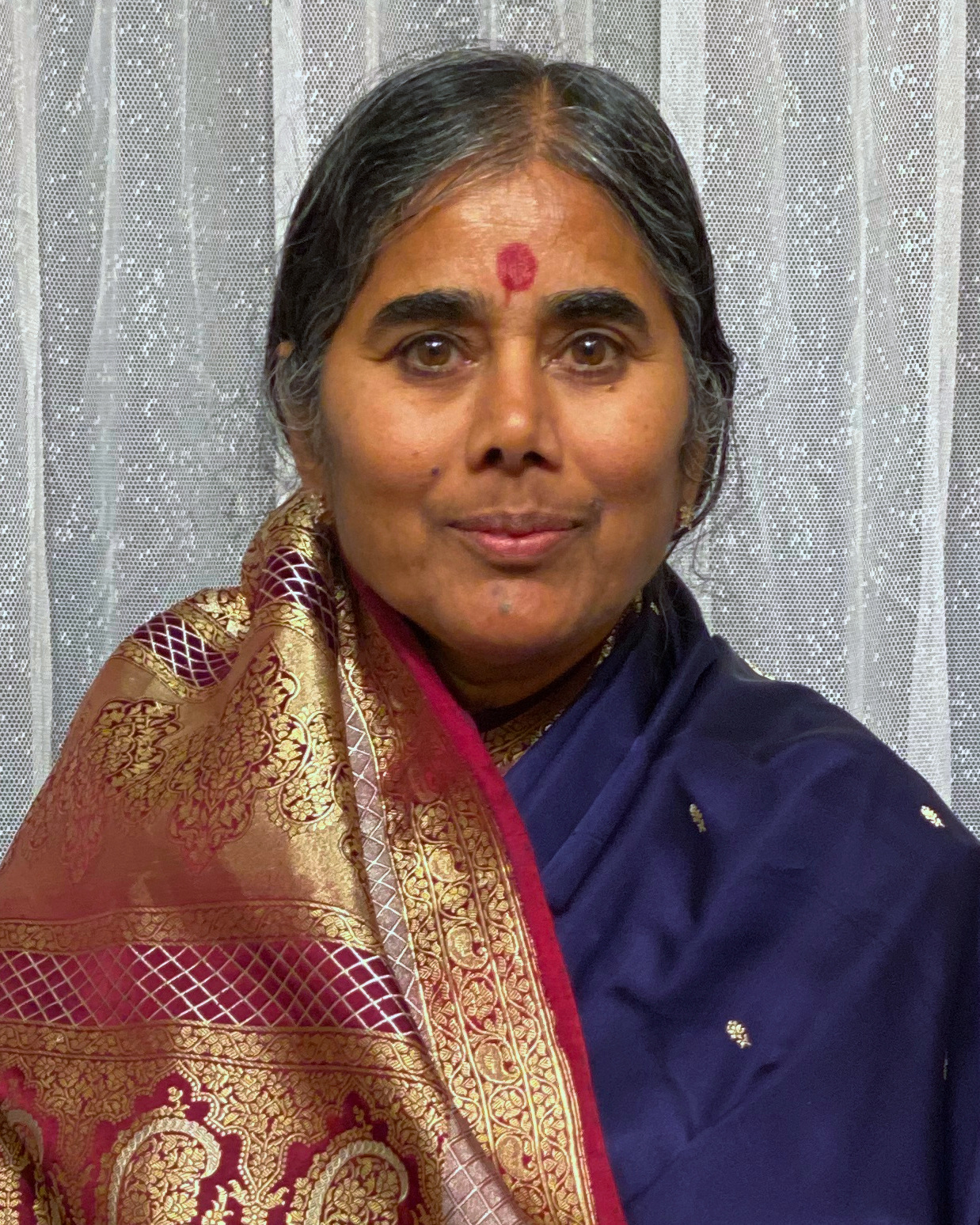 Mutter Meera, März 2020